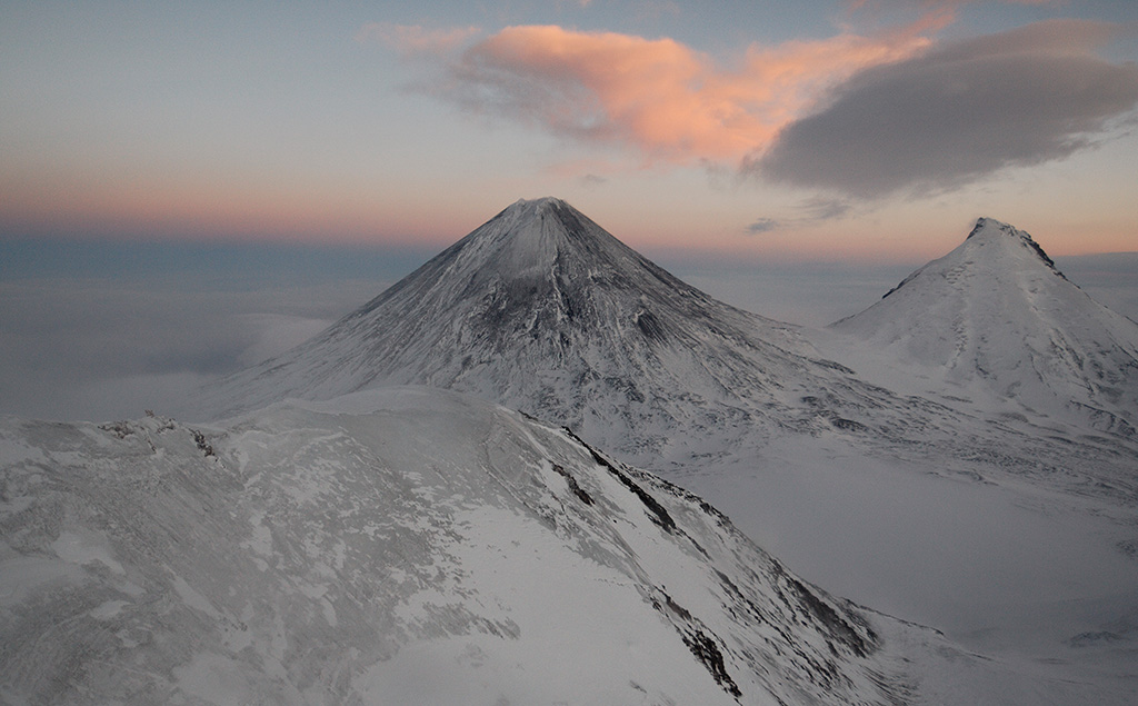 Ключевская сопка